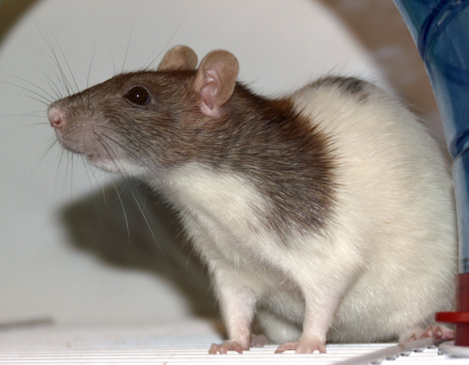 Domestic female rat